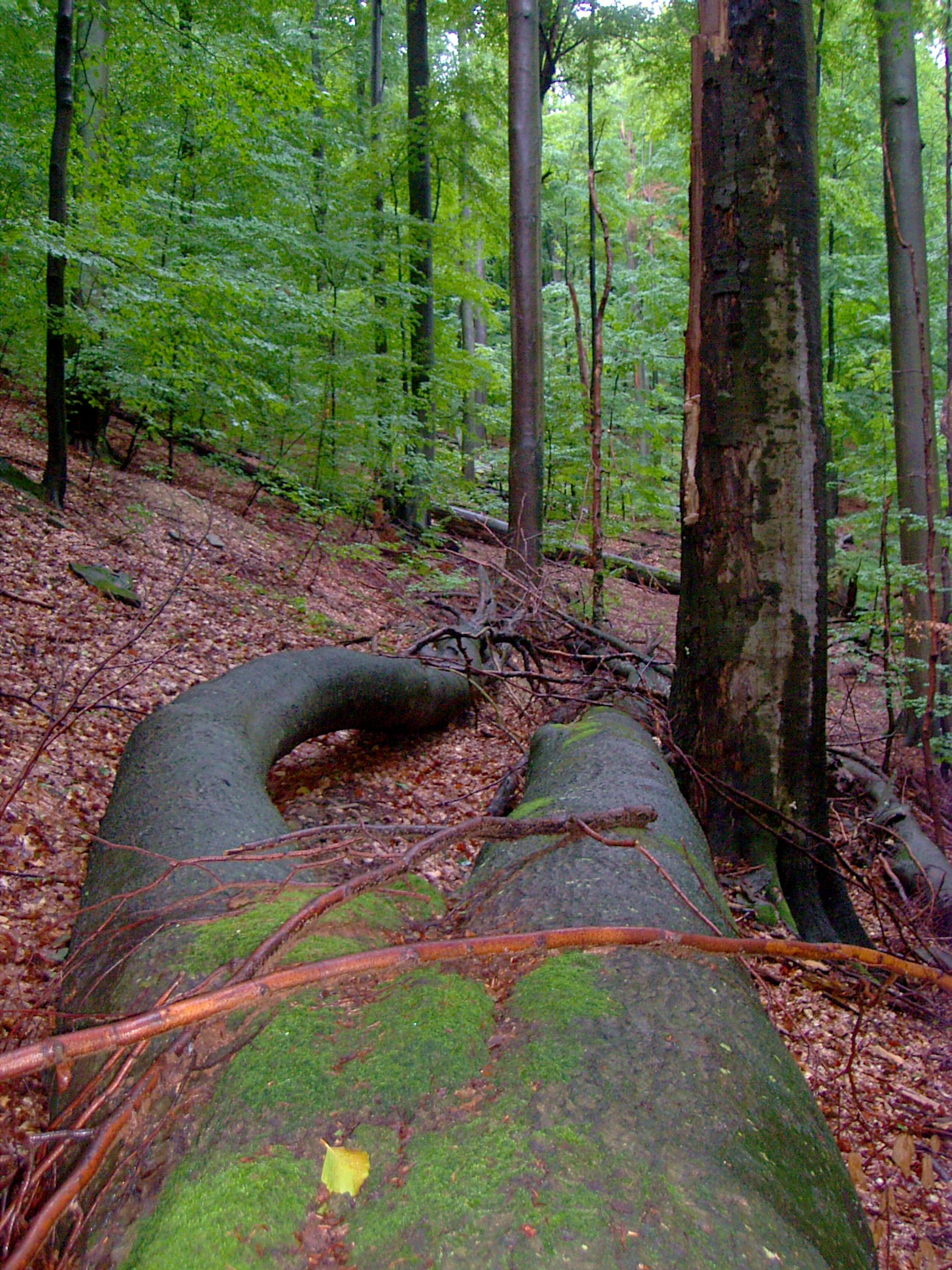 Liegende tote Rotbuche im Rotbuchen-Urwaldreservat Rozok, Poloniny Nationalpark (Slowakei).